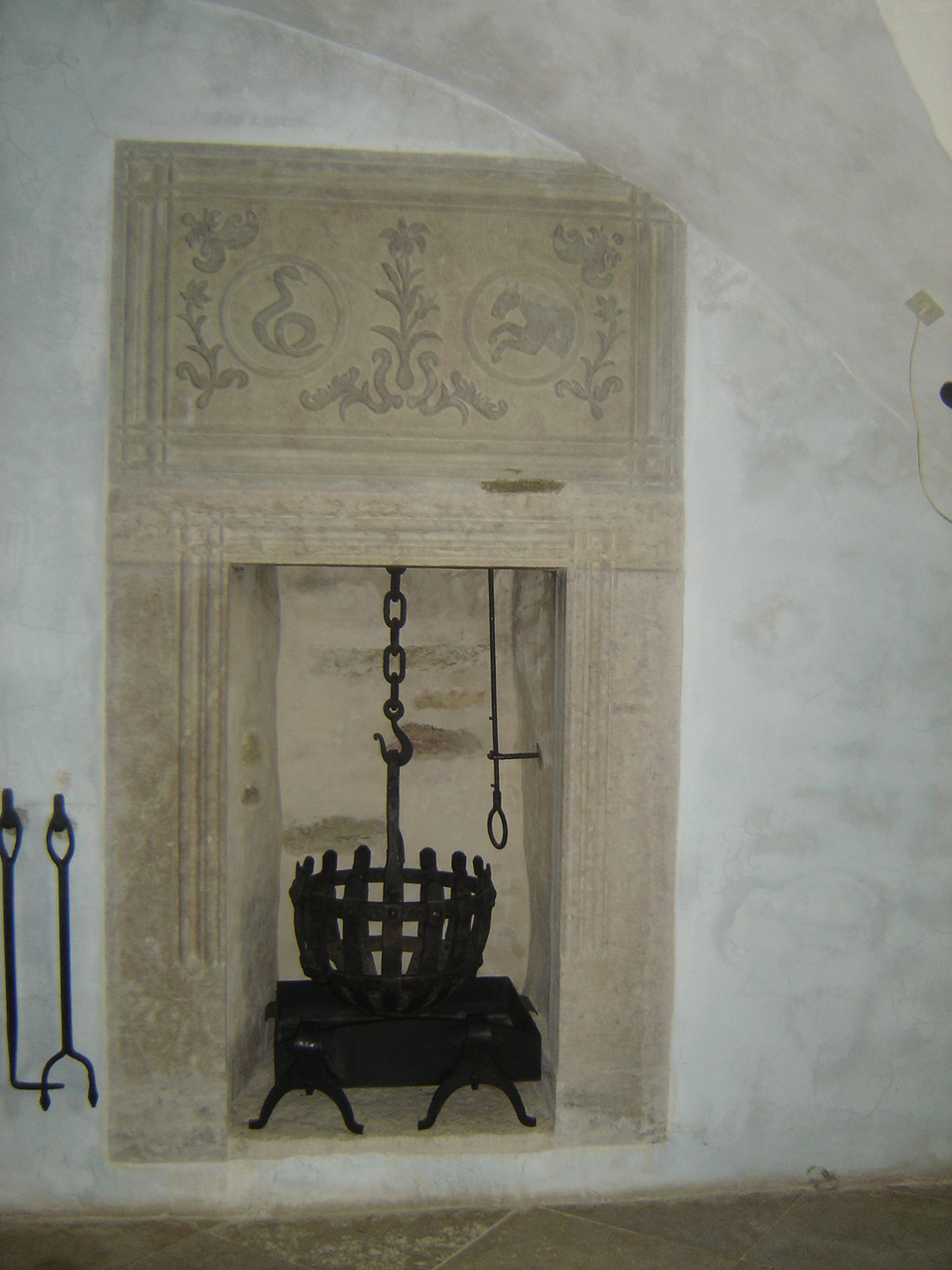 Purtse vasallilinnuse naistetoa korvkamin